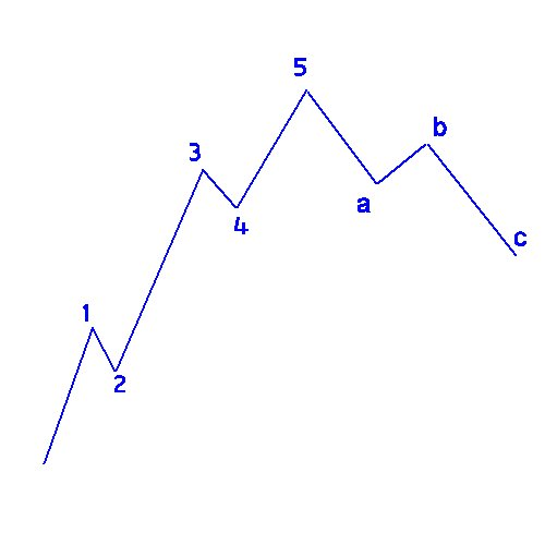 Gráfico representativo sobre la Teoría de Elliott de la composición general de las ondas en los mercados financieros.